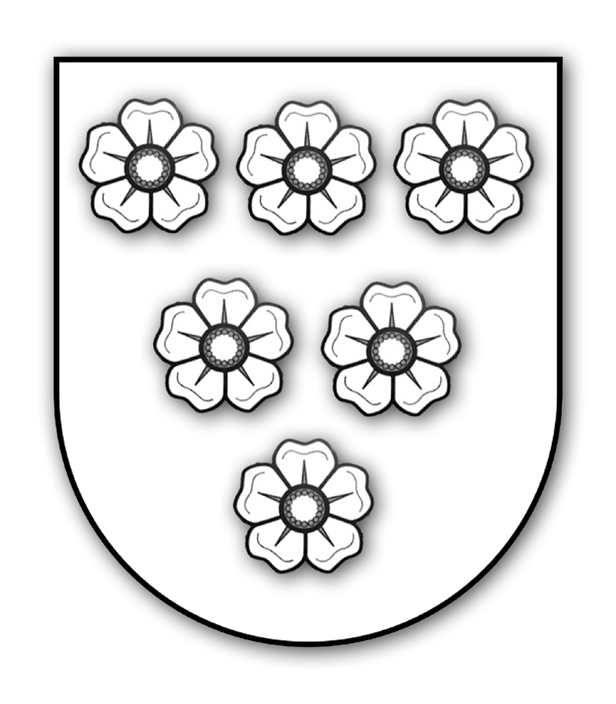 Brasão Pecchio - Pechis - Pichi de Veneza, descendente dos Pecchio de Milão.